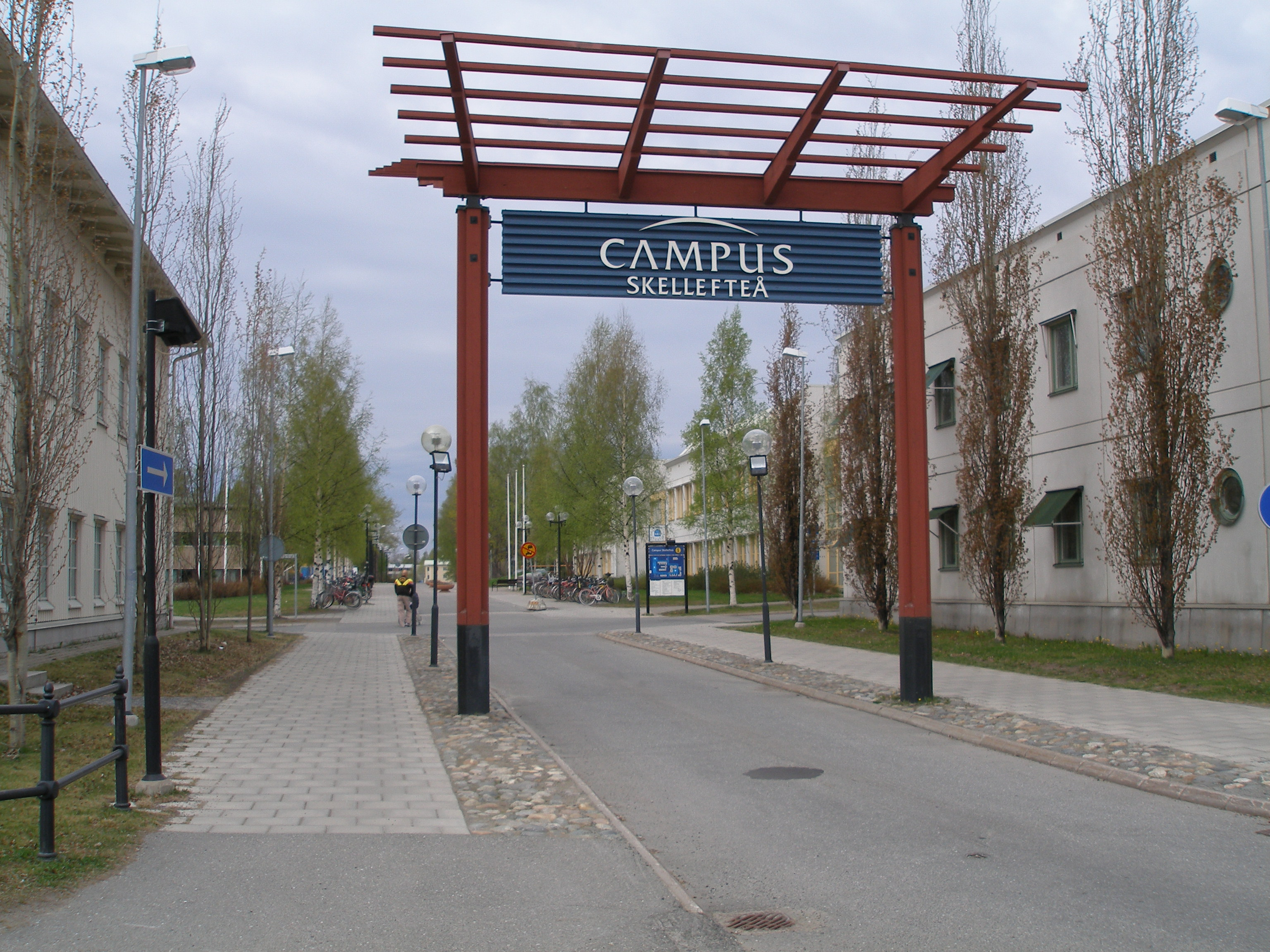 Campus i Skellefteå. Centrum för högre utbildning. UMU och LTU har filialer här.